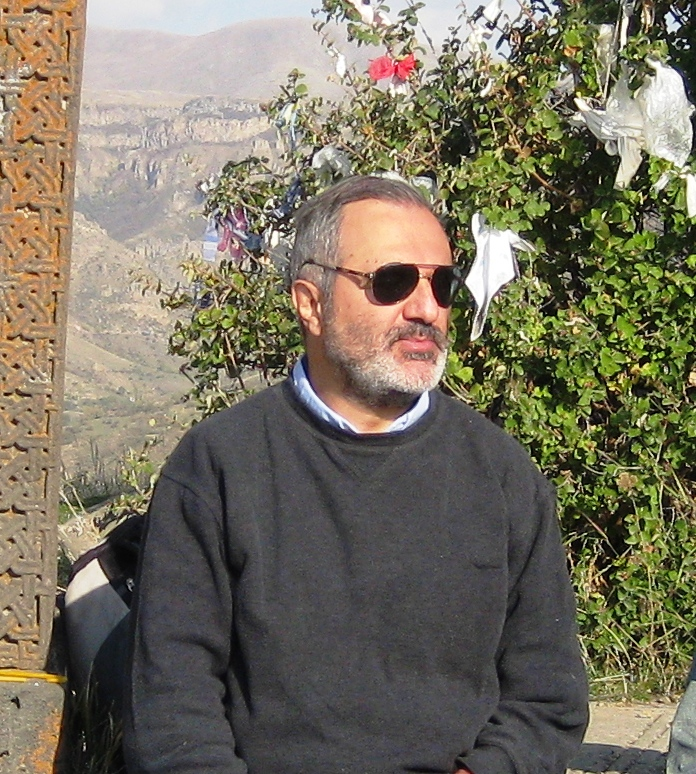 Ալեք Ենիգոմշյան